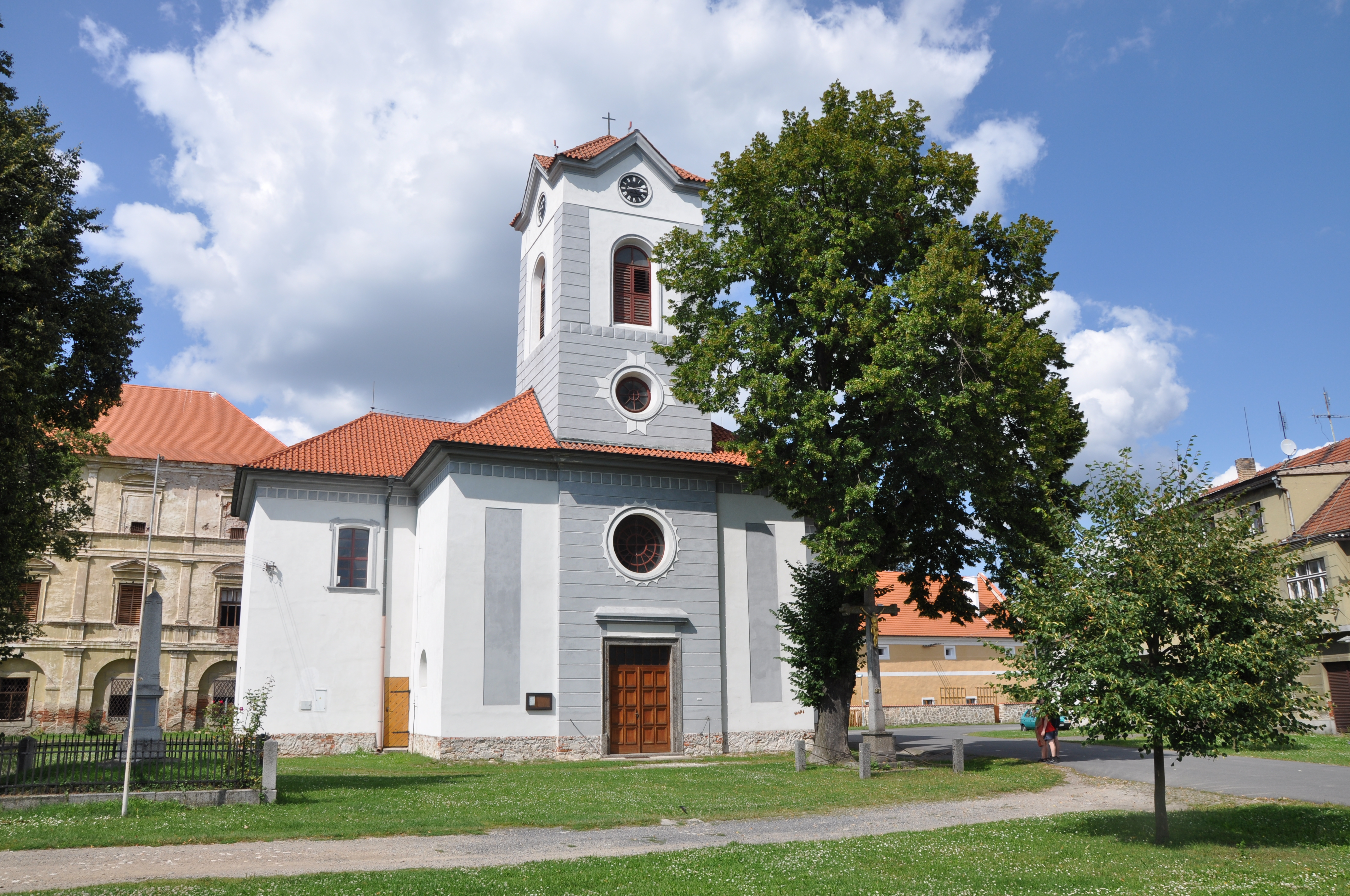 Kostel svaté Kateřiny v obci Kestřany (okres Písek).